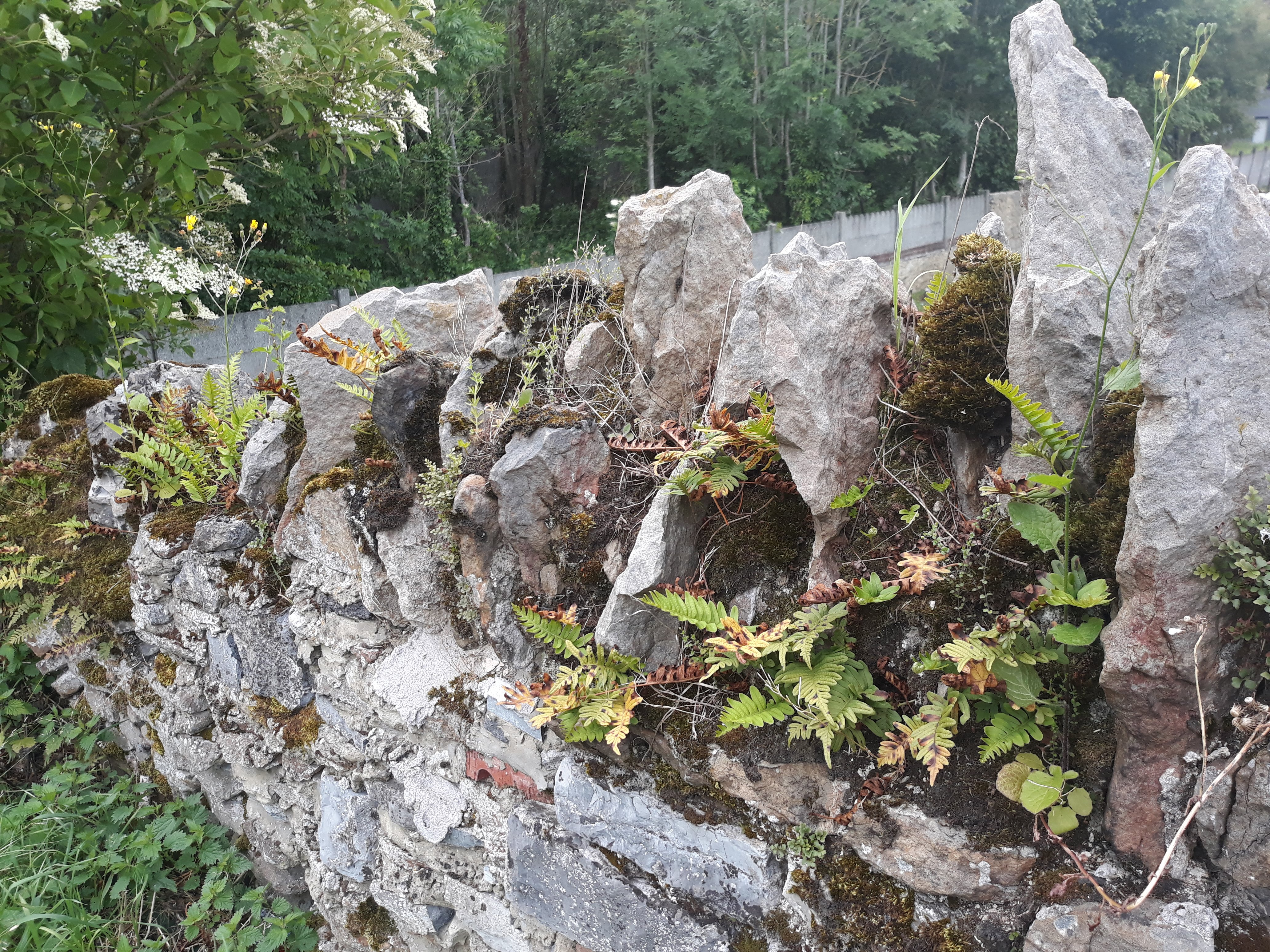 vue sur une crête à cayaux en cours de végétalisation